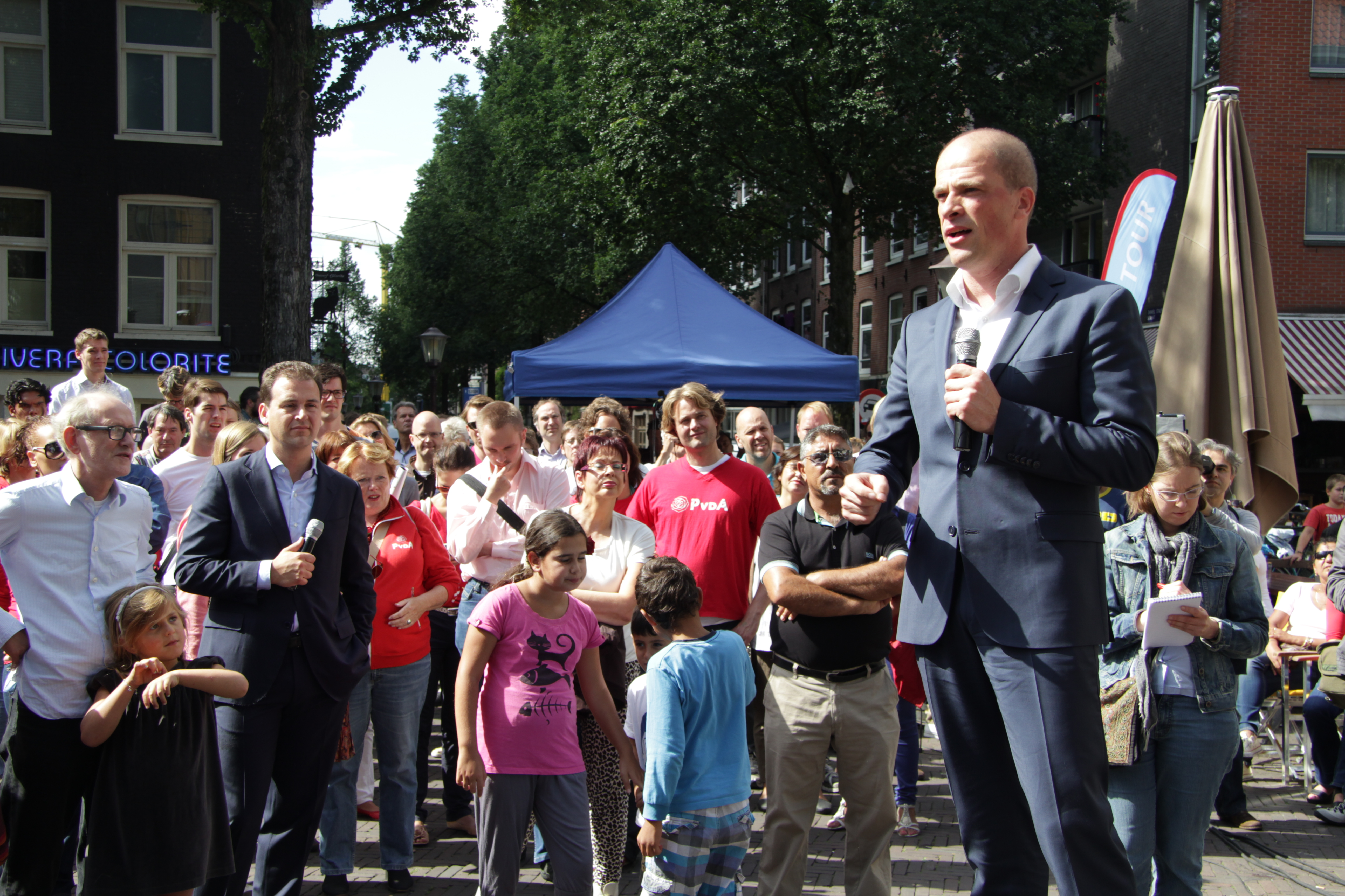 PvdA-lijsttrekker Diederik Samsom op campagne in Amsterdam voor de Tweede Kamerverkiezingen 2012. Links (met microfoon): de Amsterdamse PvdA-wethouder Lodewijk Asscher